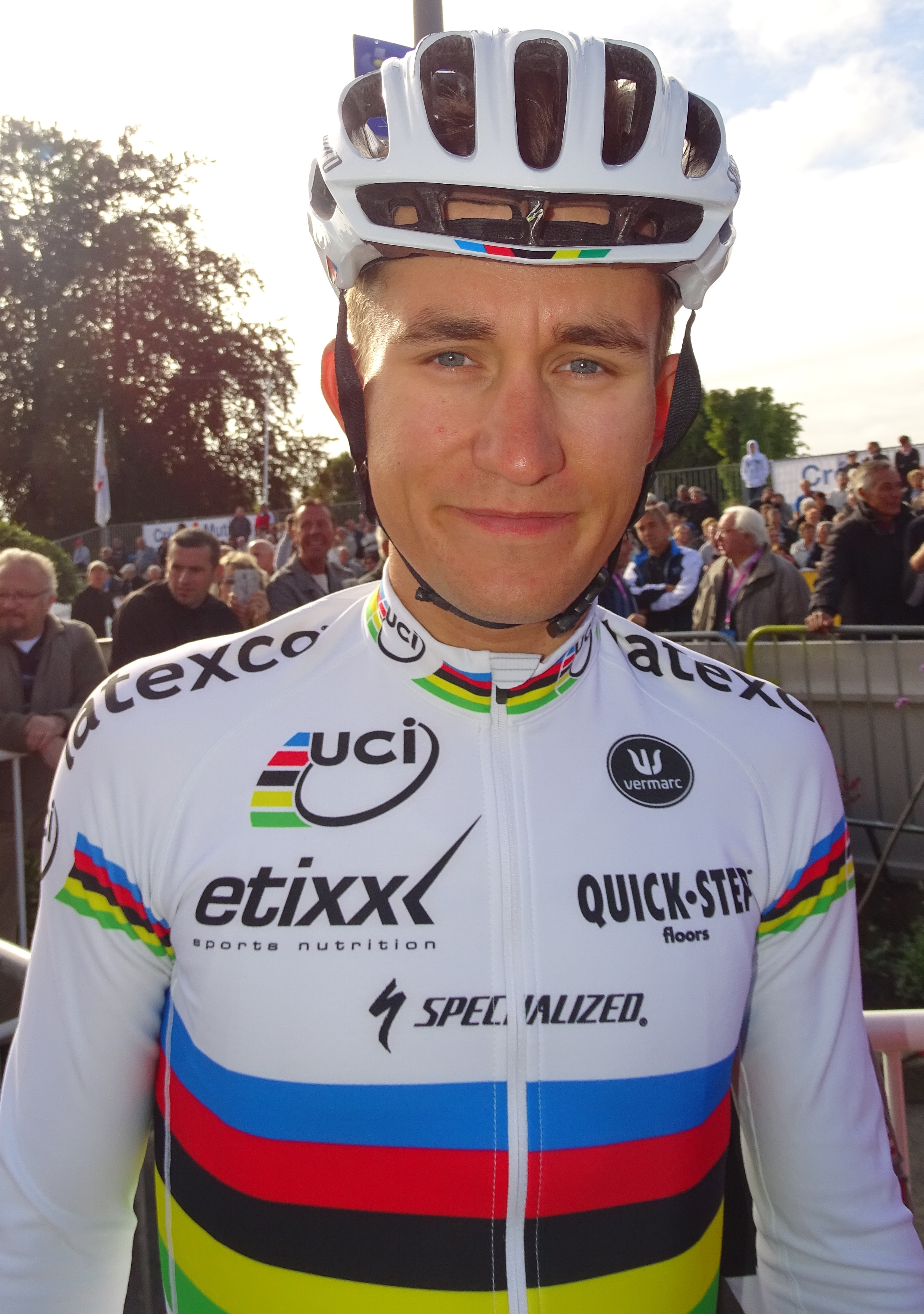 Reportage réalisé le dimanche 6 septembre à l'occasion du départ et de l'arrivée du Grand Prix de Fourmies 2015 à Fourmies, Nord-Pas-de-Calais, France.